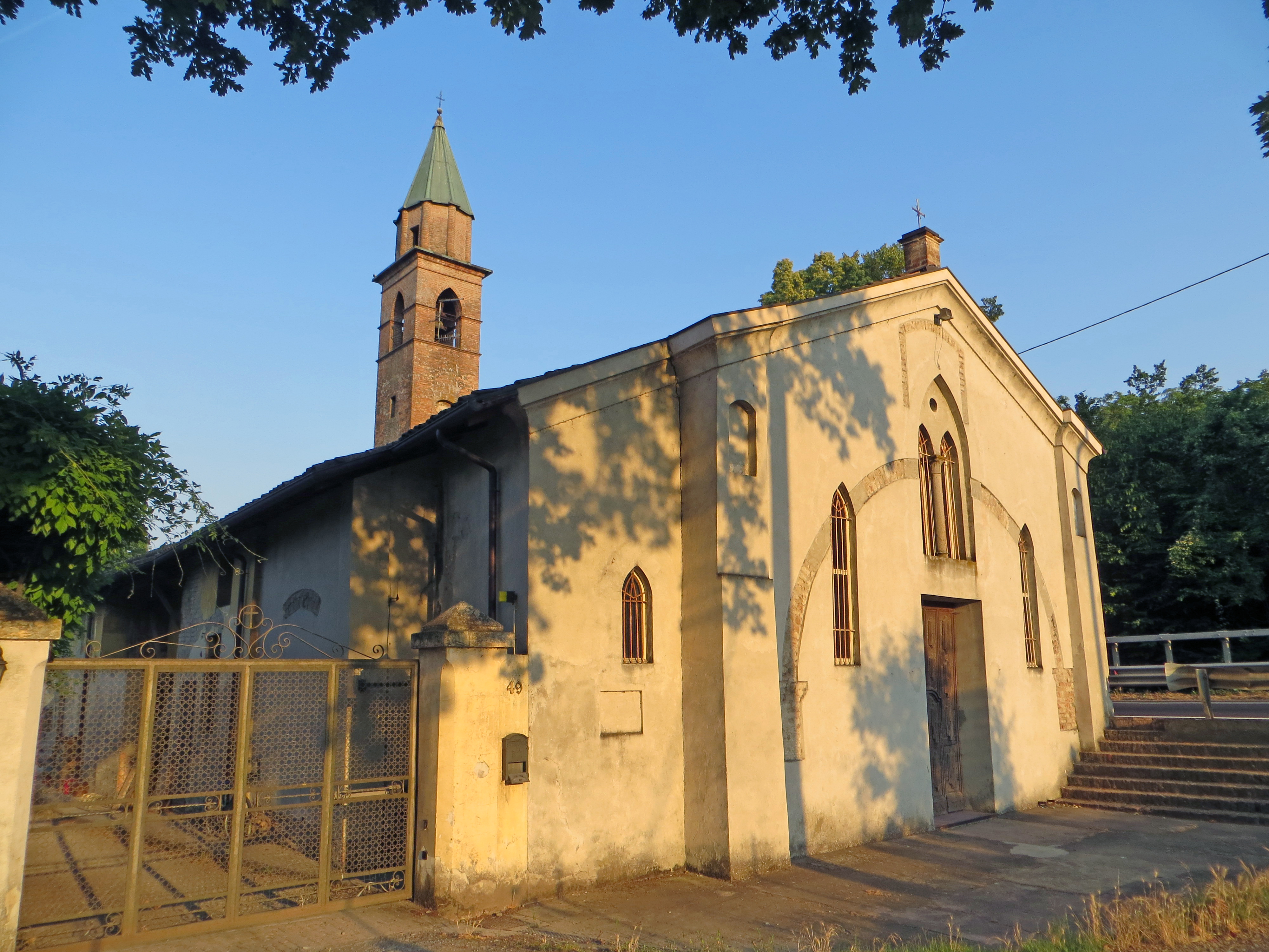 Chiesa di Santa Maria Maddalena (Castelguelfo) - angolo nord-ovest